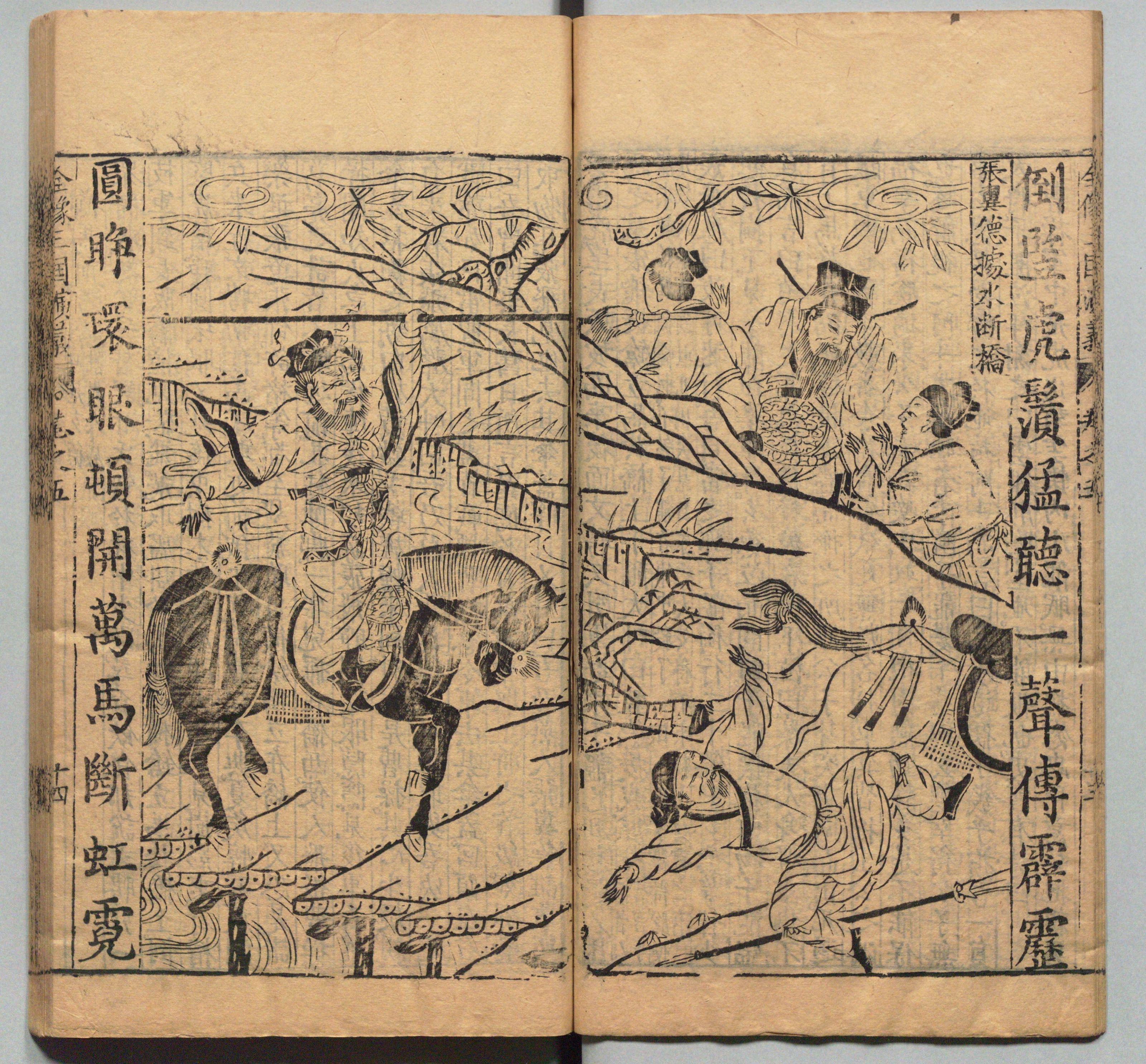 新刊校正古本大字音释三国志通俗演义 明万历十九年书林周曰校刊本